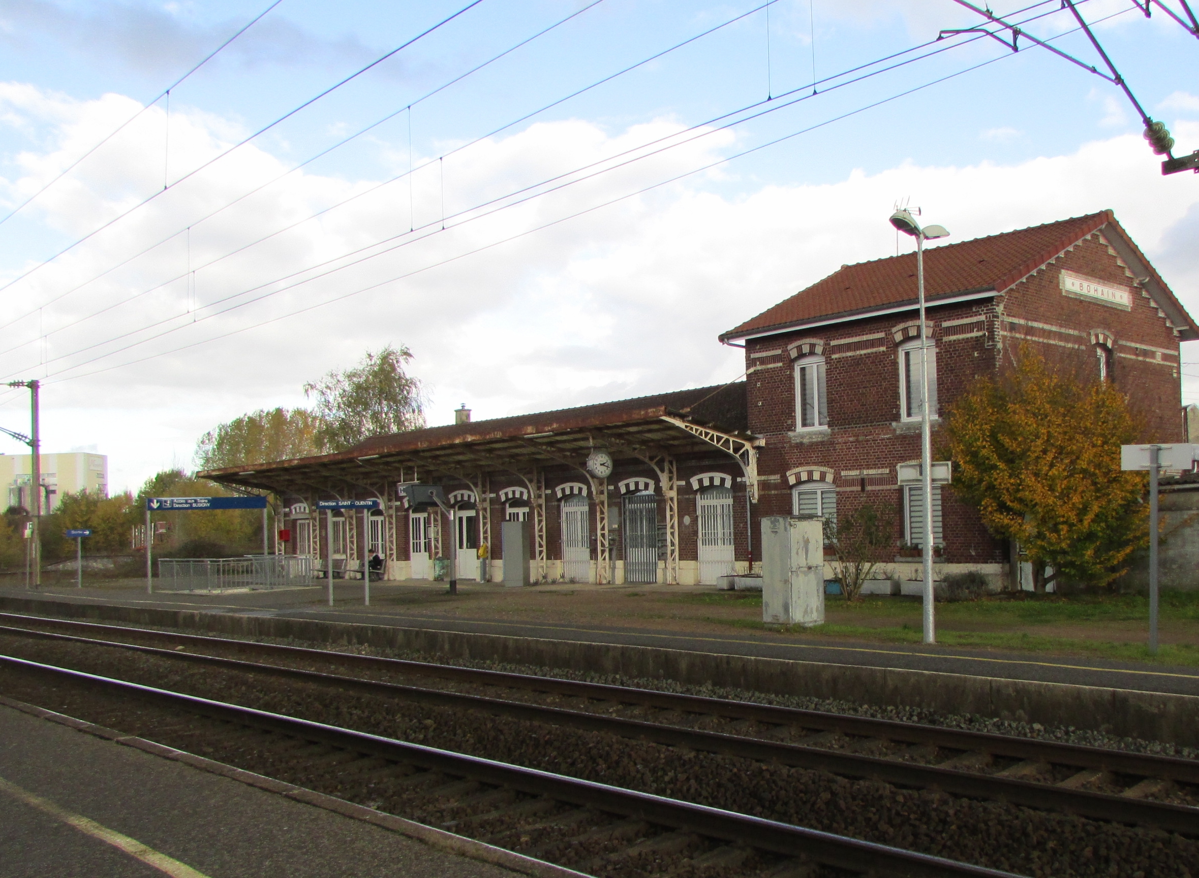 La gare de Bohain aujourd'hui.